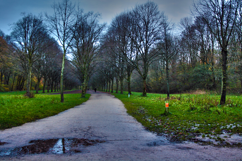 Zicht op een deel van het Amsterdamse Bos